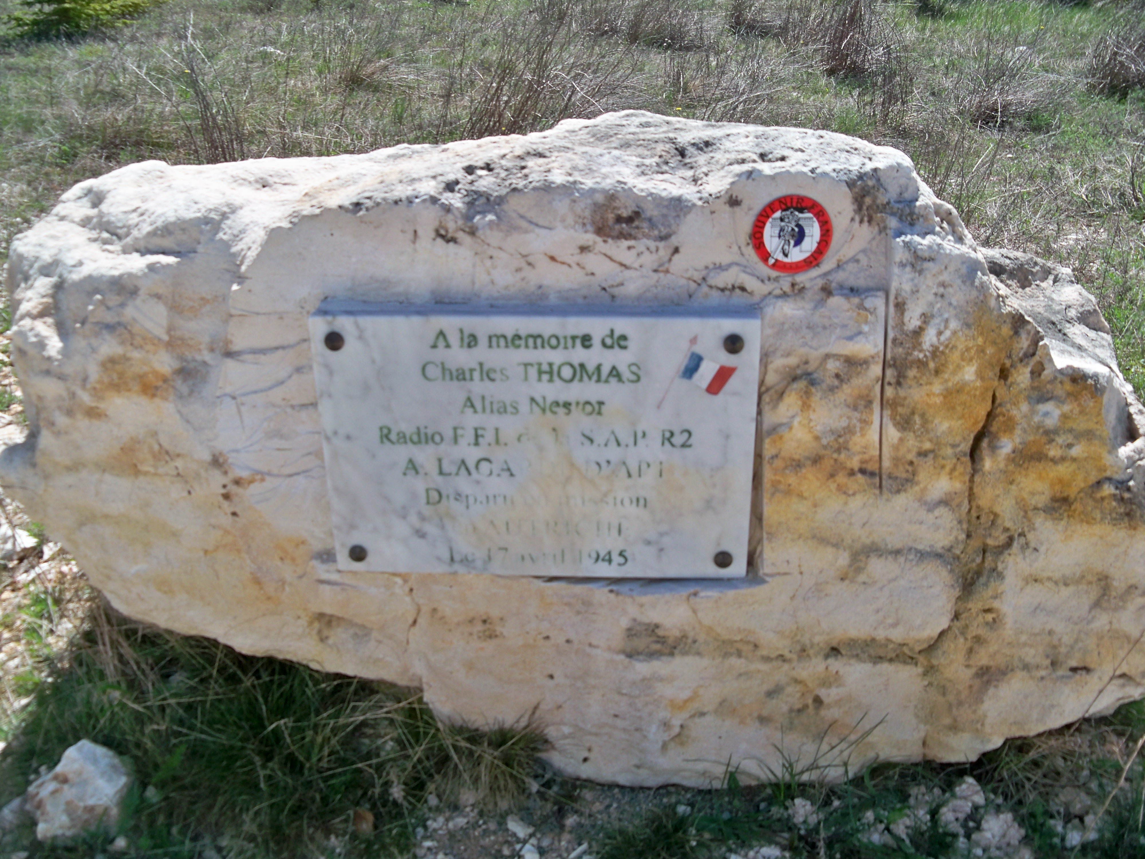 Stèle hommage à Charles Thomas, alias "Nestor"